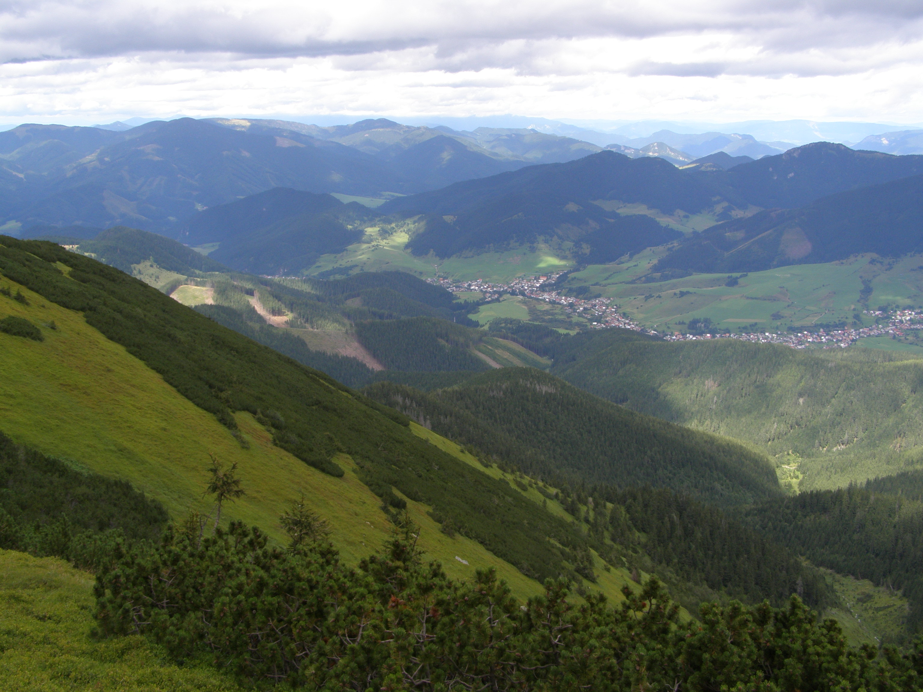 Nízké Tatry, Ďumbierské Tatry, pohled z úbočí vrcholu Košarisko (1695 m) na severozápad: v údolí obec Liptovská Lúžna